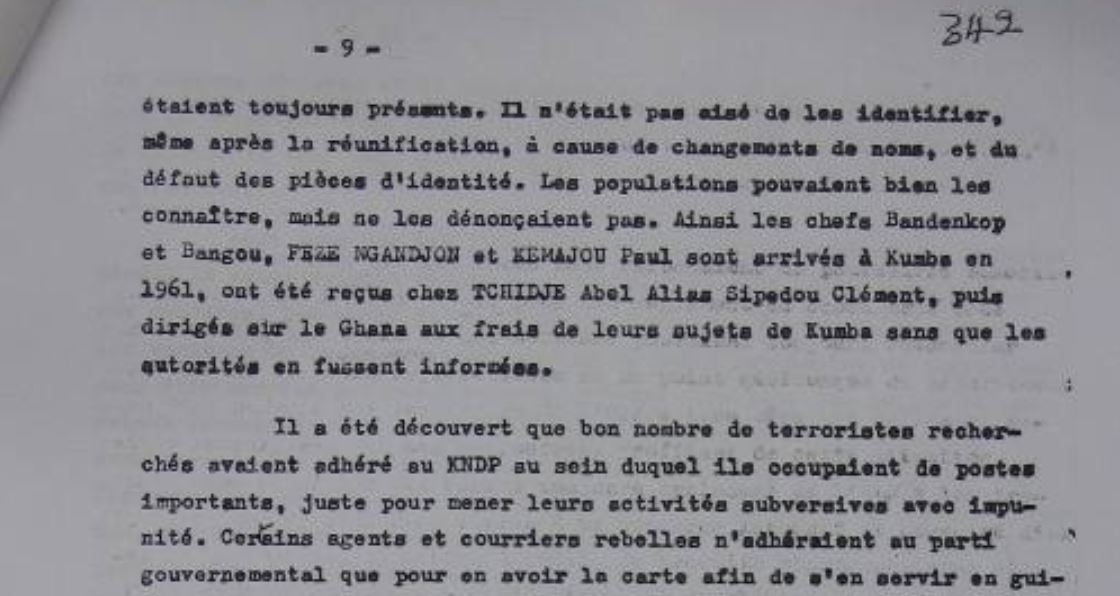 Note d'archive sur le financement de l'exil de Paul-Bernard KEMAYOU de Kumba vers Accra Paul-Bernard Kemayou, 12ème Roi de Bangou, homme politique et résistant anticolonialiste camerounais